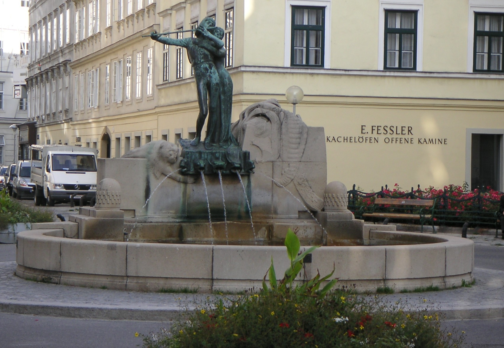 der Mozart-Brunnen (Zauberflötenbrunnen) in Wien